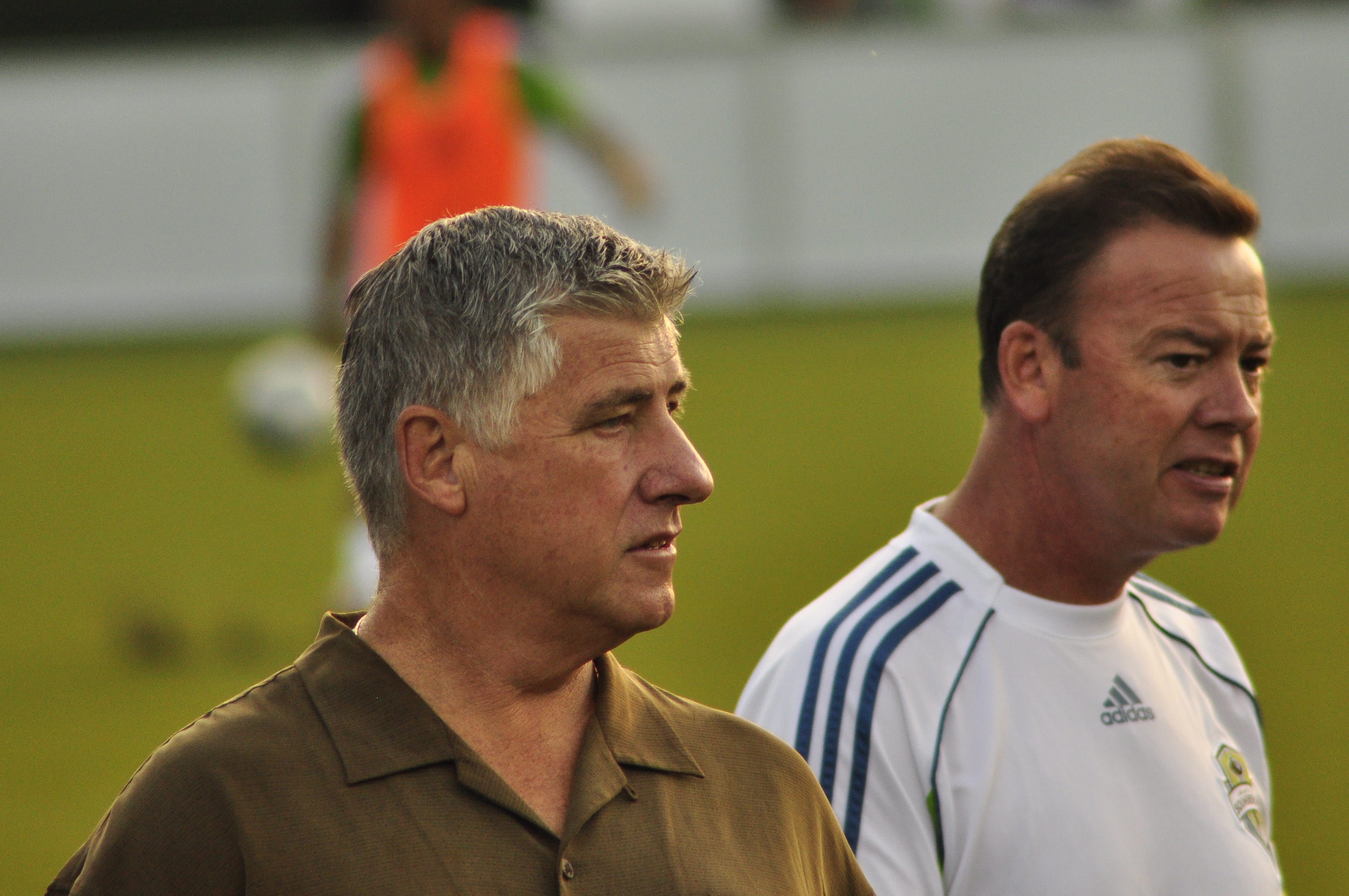 Sigi Oi